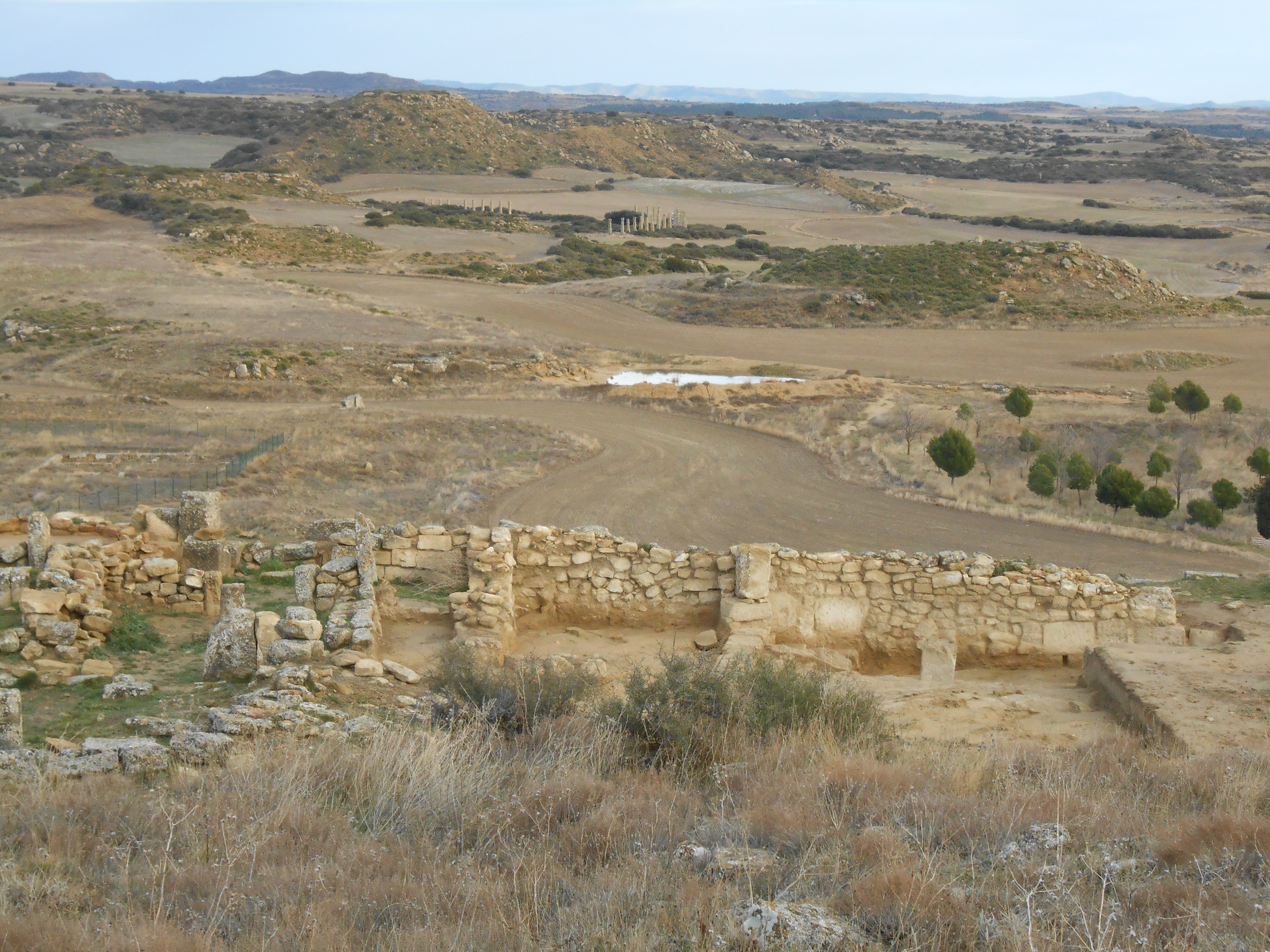 El Pueyo de Los Bañales. VIsta general